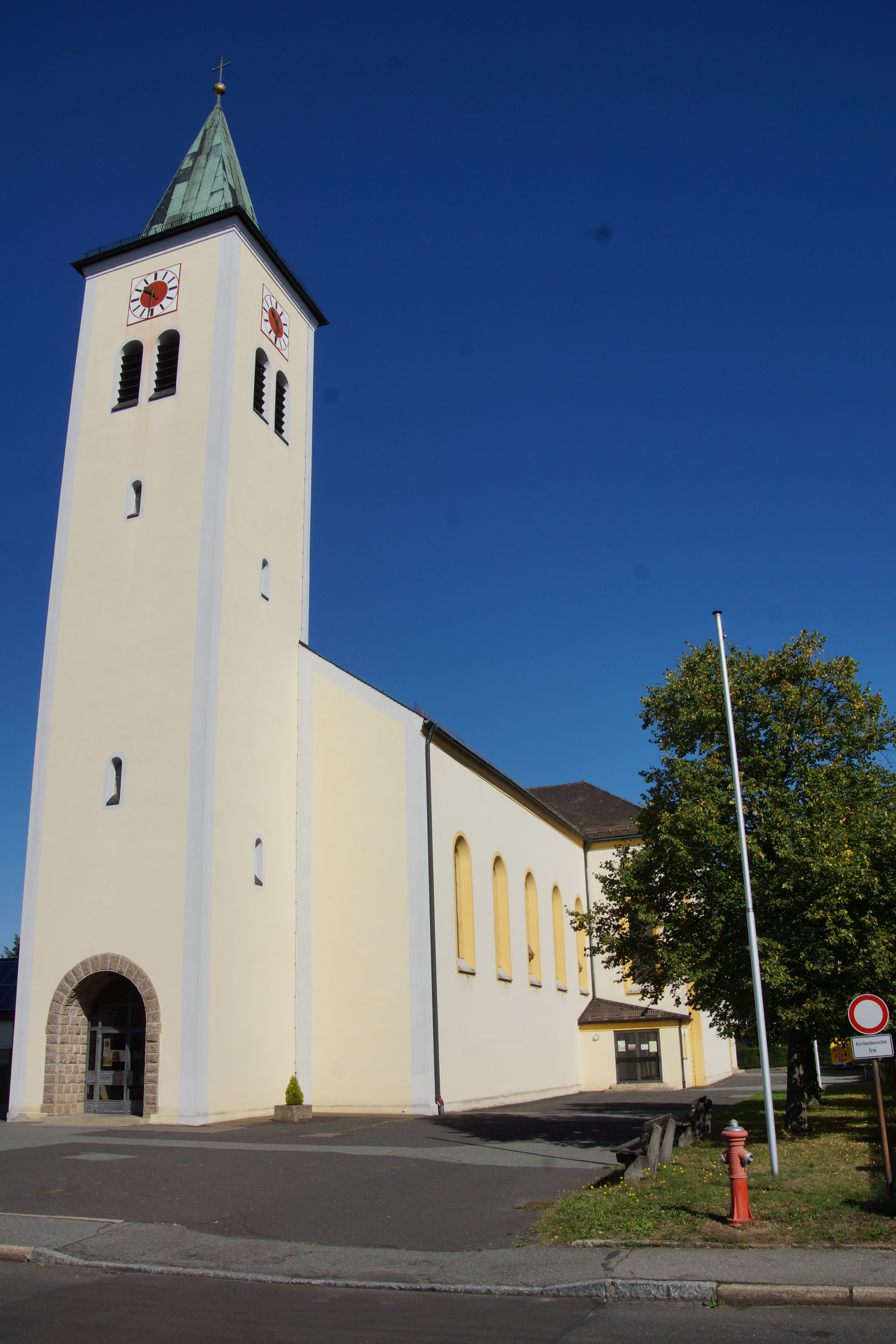 Heilige Familie - Weiherhammer